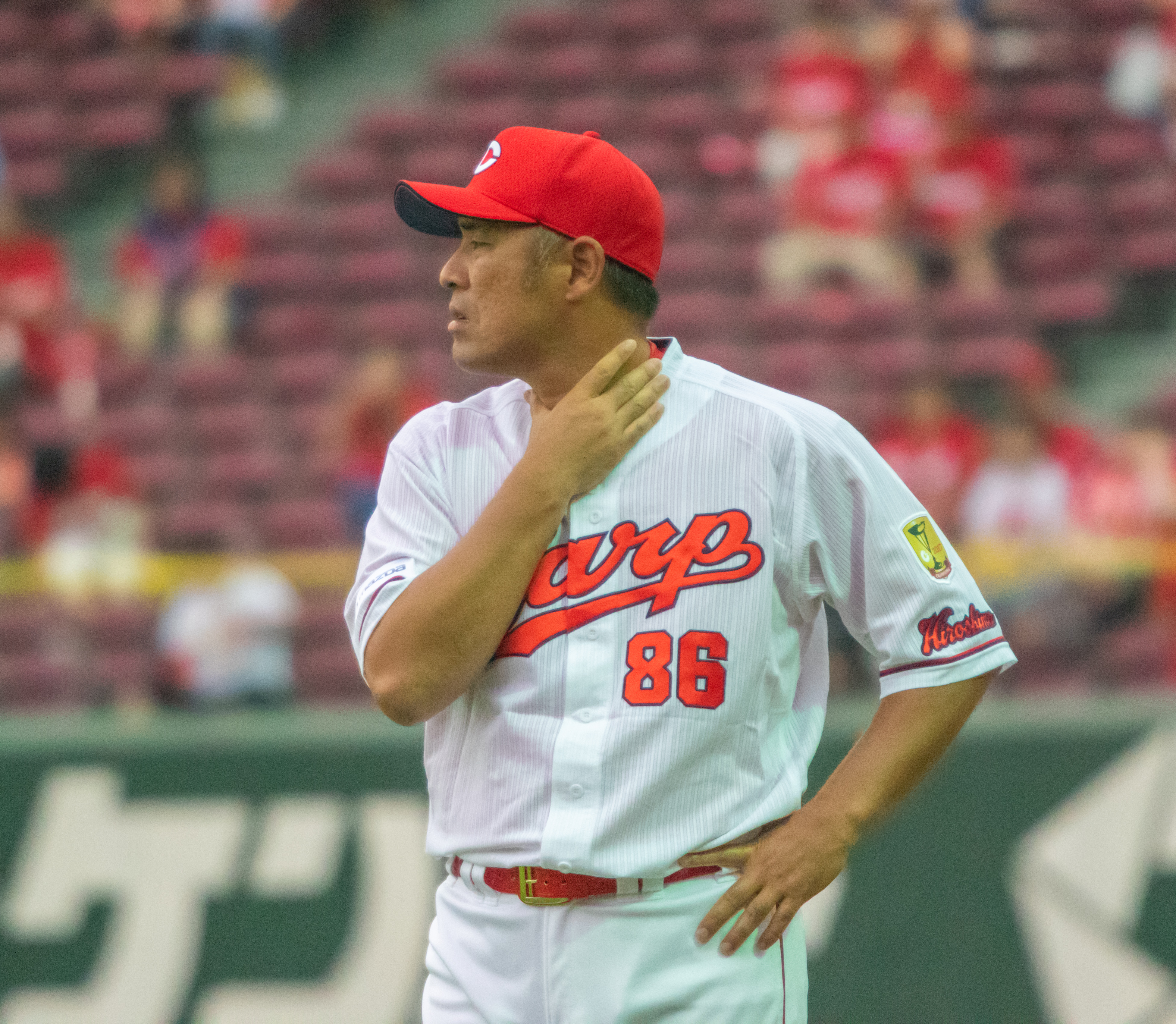 2018/9/6 マツダスタジアム